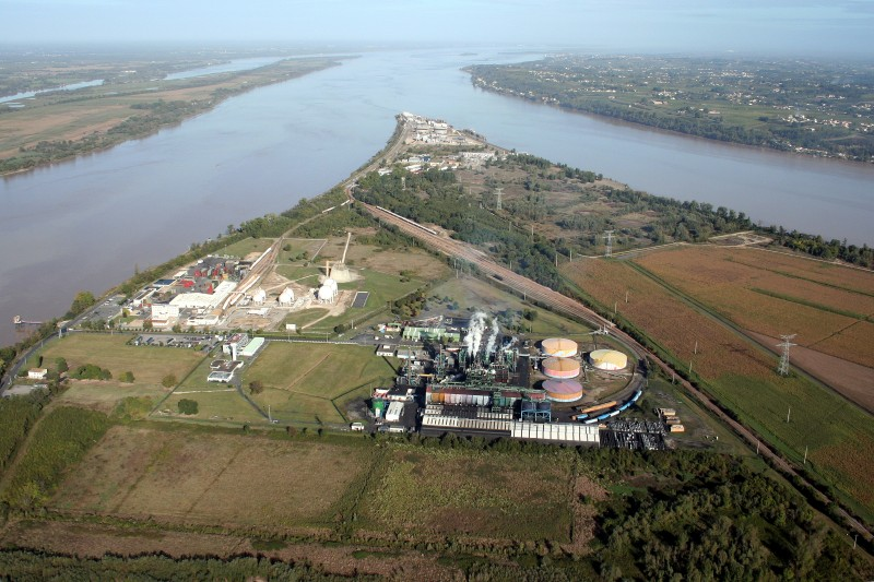 Terminal d'Ambès © Port de Bordeaux / Taso